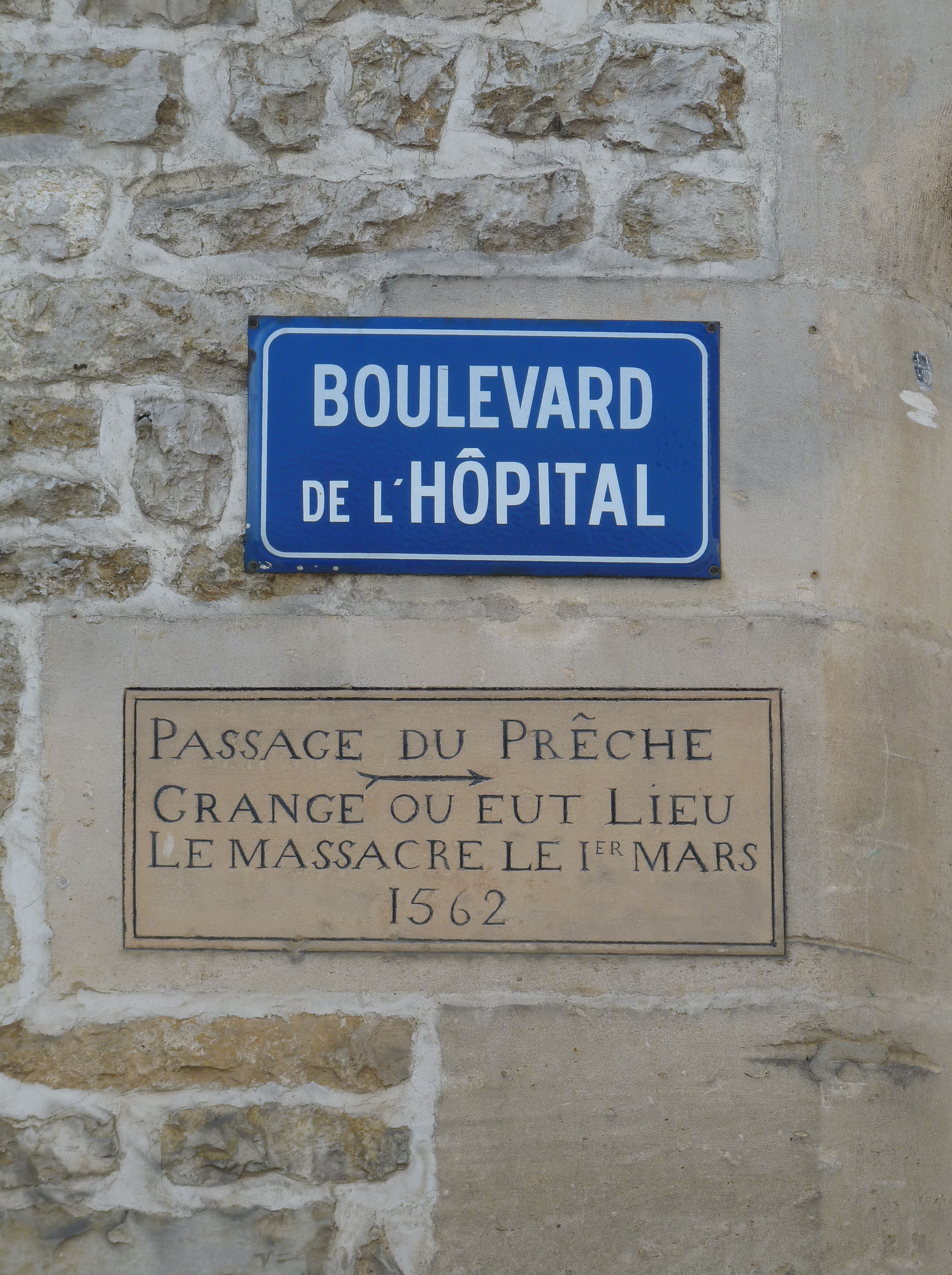 Grange du Massacre à Wassy (Haute-Marne)